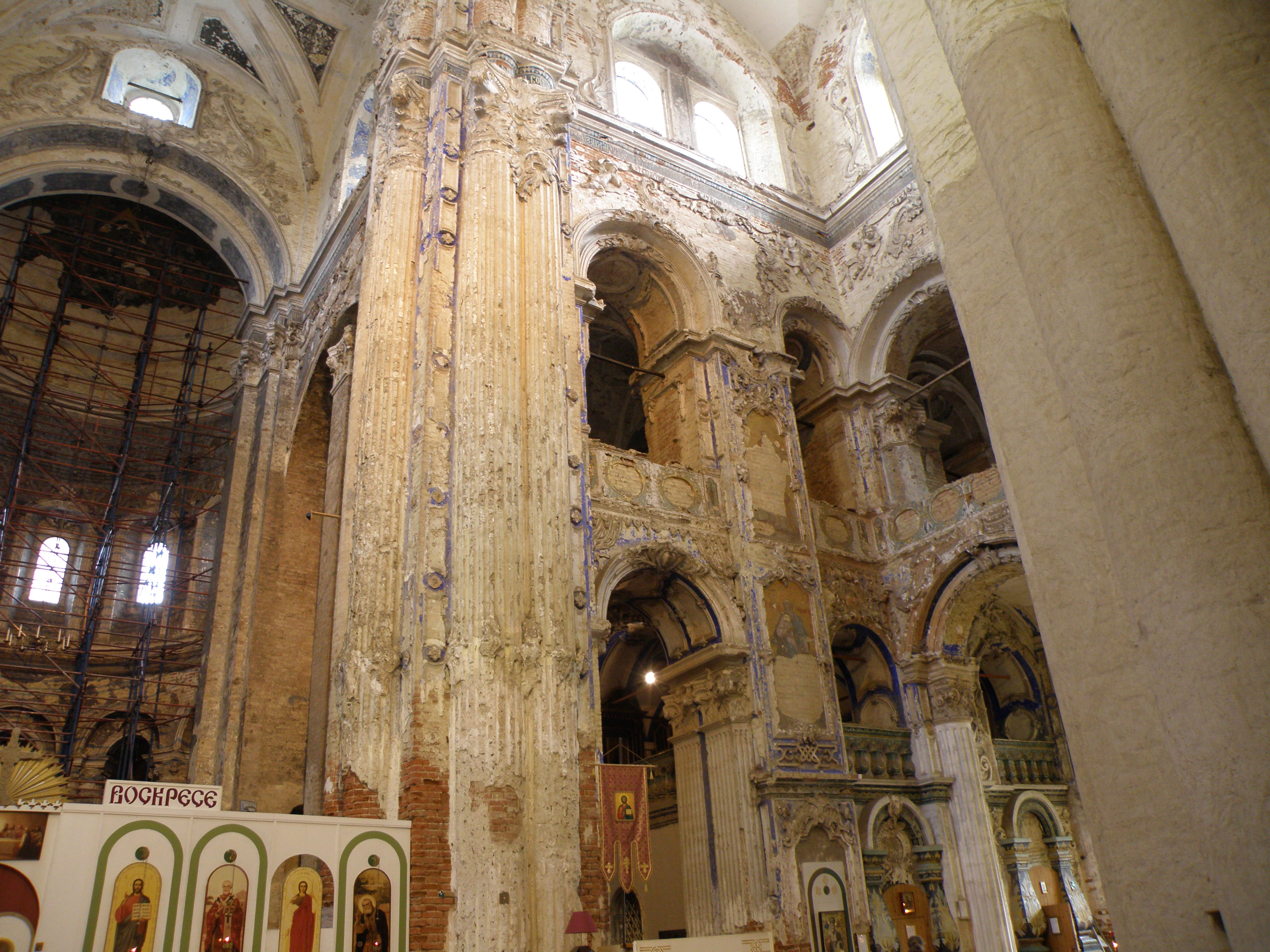 Хоры у южной стены Воскресенского собора Новоиерусалимского монастыря